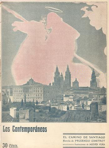 Portada de El camino de Santiago.